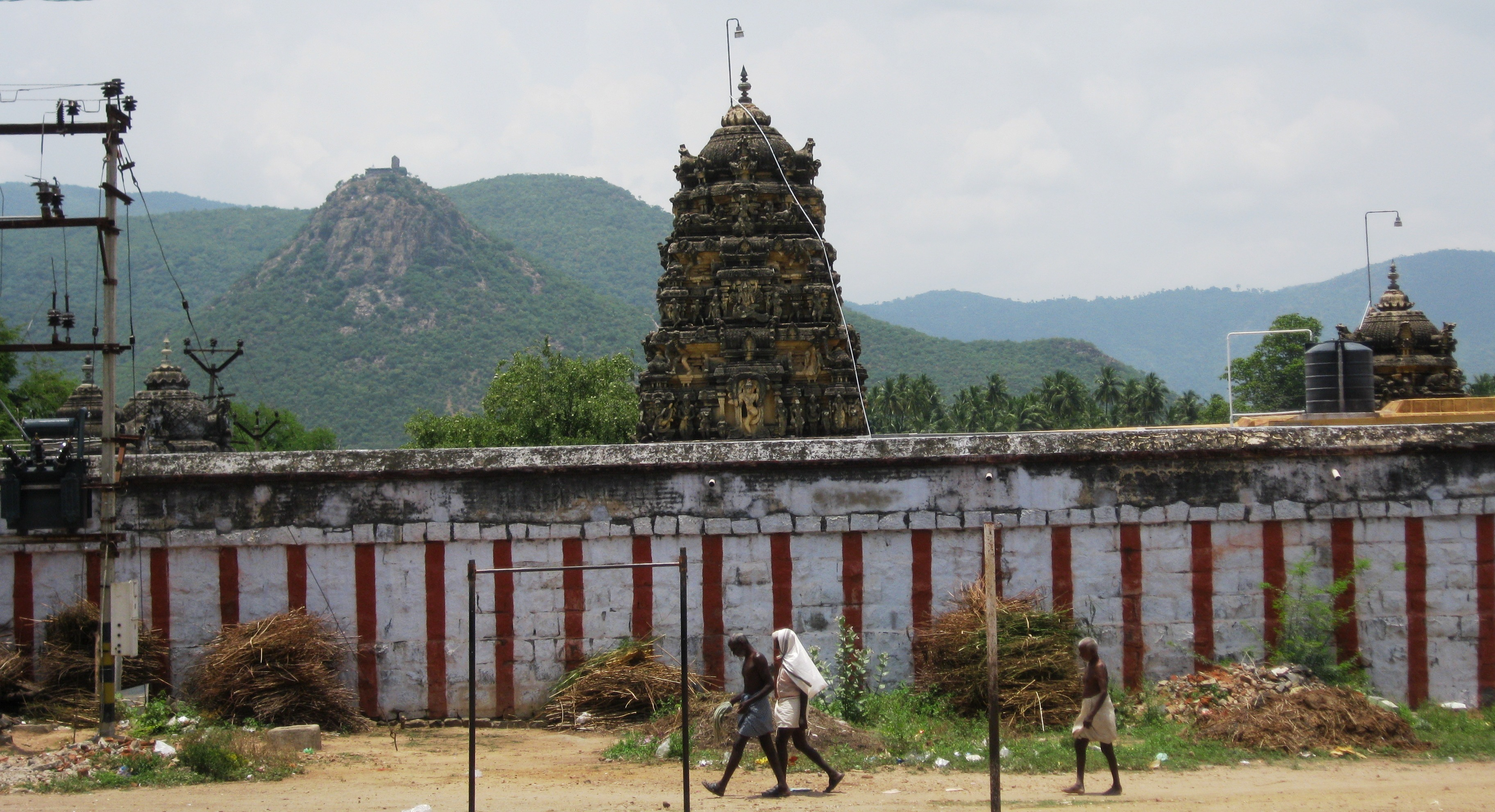 SIVAN TEMPLE & PERIYA MAARIAMMAN TEMPLE, Pethanaickenpalayam, Salem